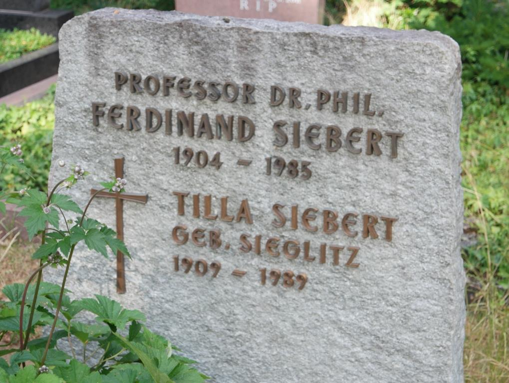 Grab des Historikers Ferdinand Siebert, 1904-1985, auf dem Hauptfriedhof Mainz